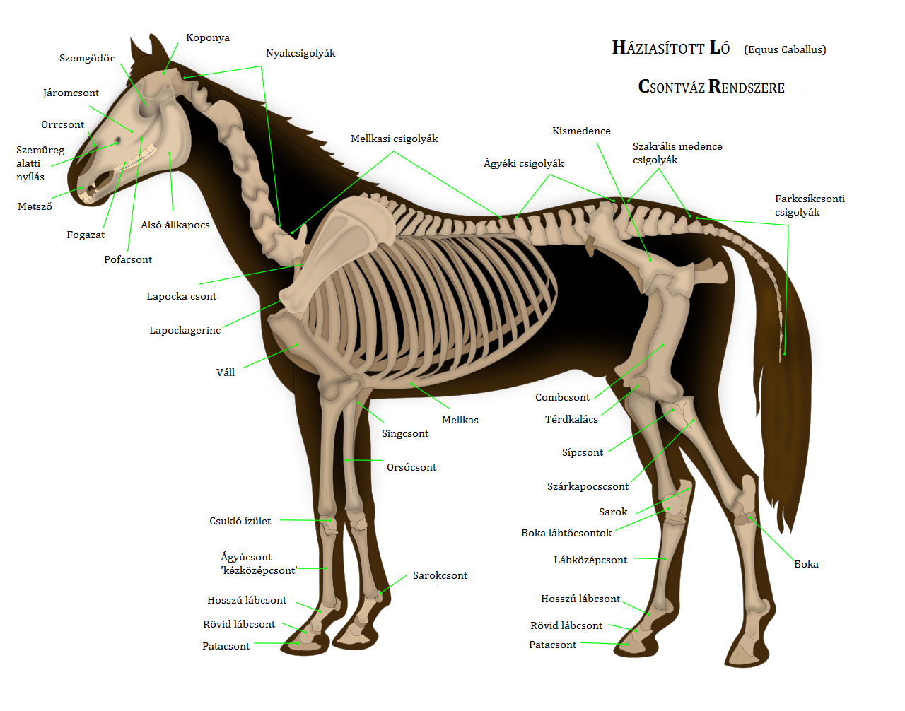 Ló csontszerkezete (anatómia)